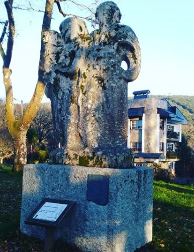 Estatua esculpida en la Carballeira de San Pedro, en Muradás; Beariz.